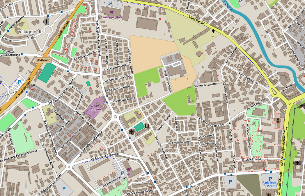 Mappa Santa Bertilla